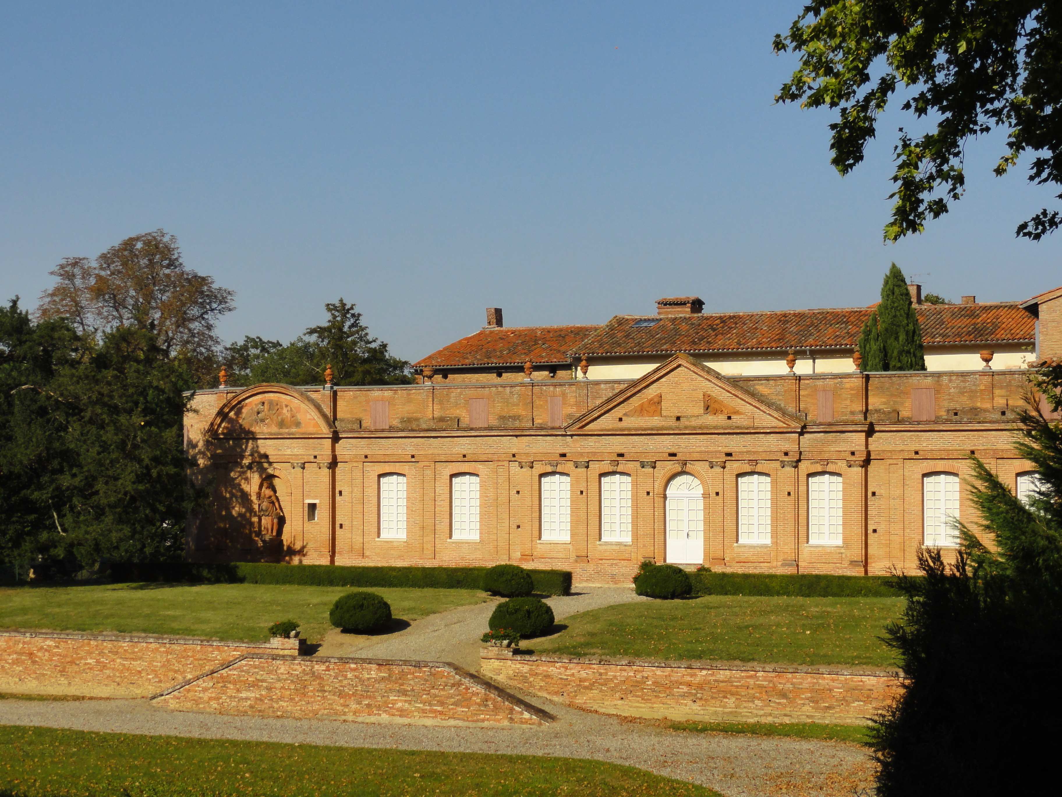 Château de Fourquevaux (Orangerie), Haute-Garonne, France.